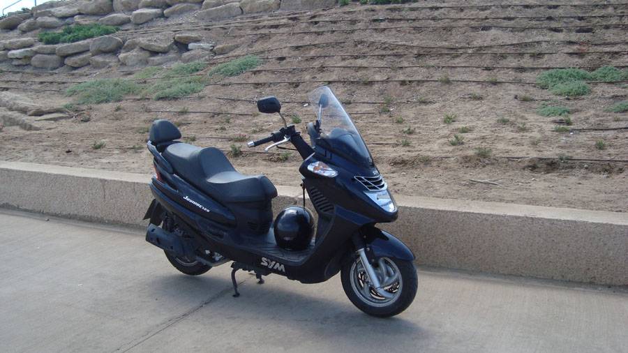 קטנוע